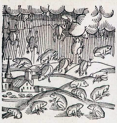 Woodcut from Prodigiorum ac ostentorum chronicon quae praeter naturae ordinem, motum, et operationem, et in superioribus & his inferioribus mundi regionibus, ab exordio mundi usque ad haec nostra tempora, acciderunt, p. 458